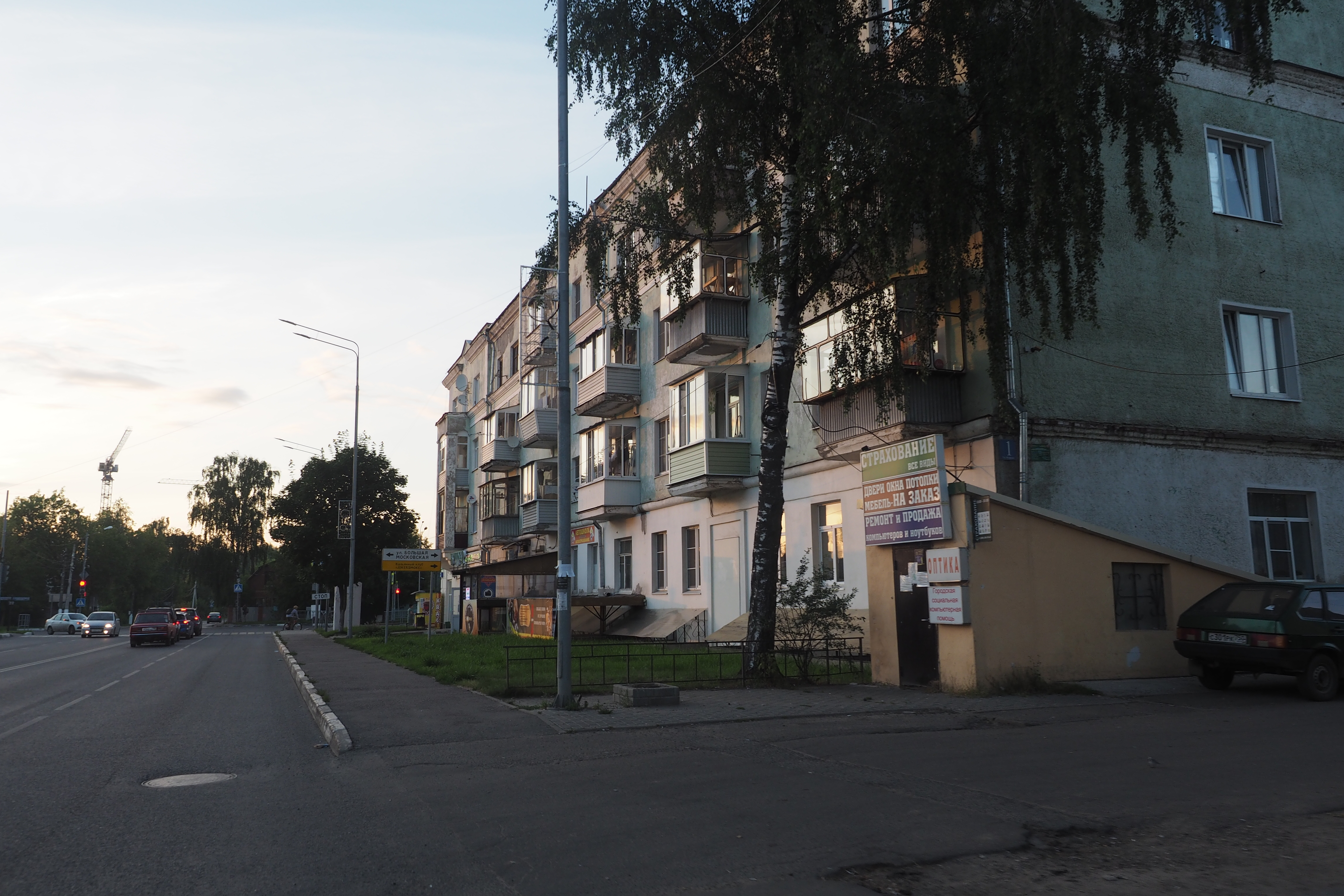 Старая Купавна улица Кирова